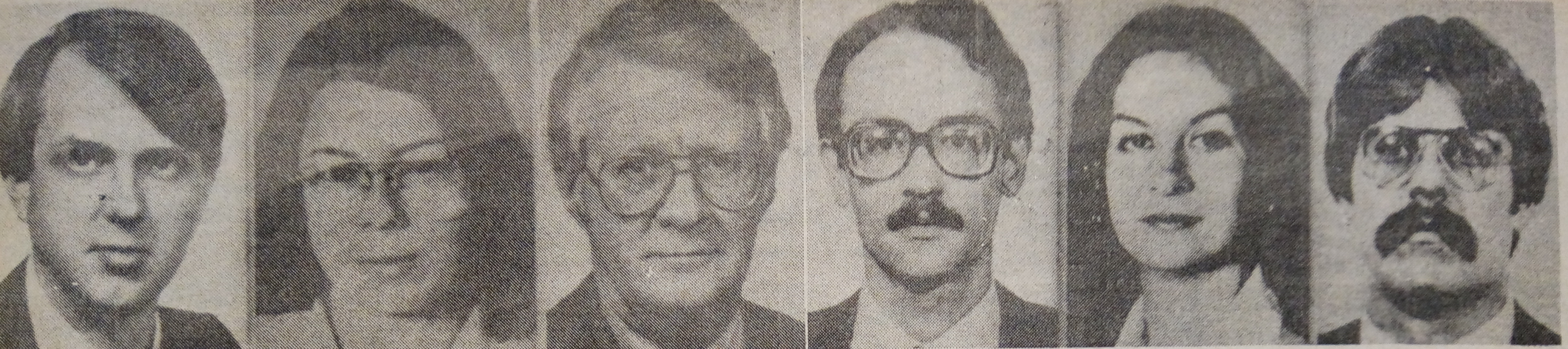 Assabah 1980